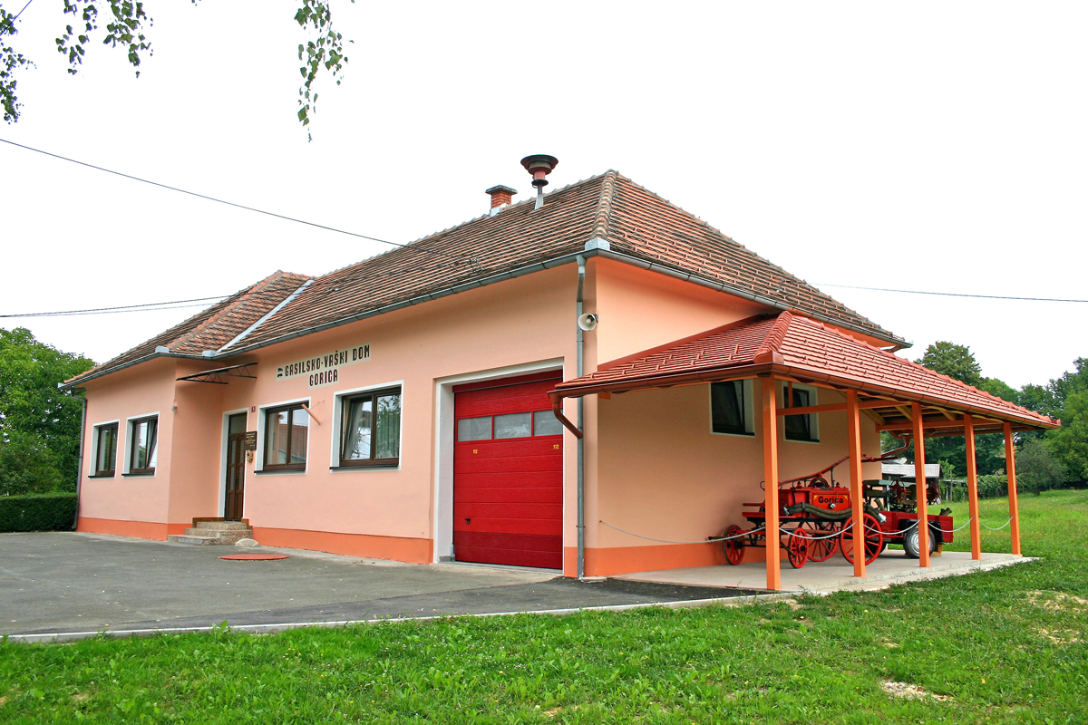 Vaško - gasilski dom Gorica